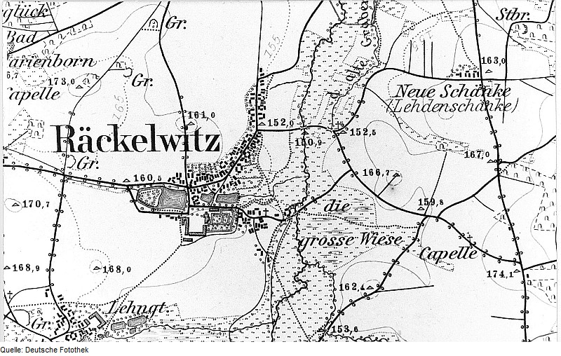 Original image description from the Deutsche Fotothek Räckelwitz. Meßtischblatt, Sekt. Kloster Marienstern, 1884